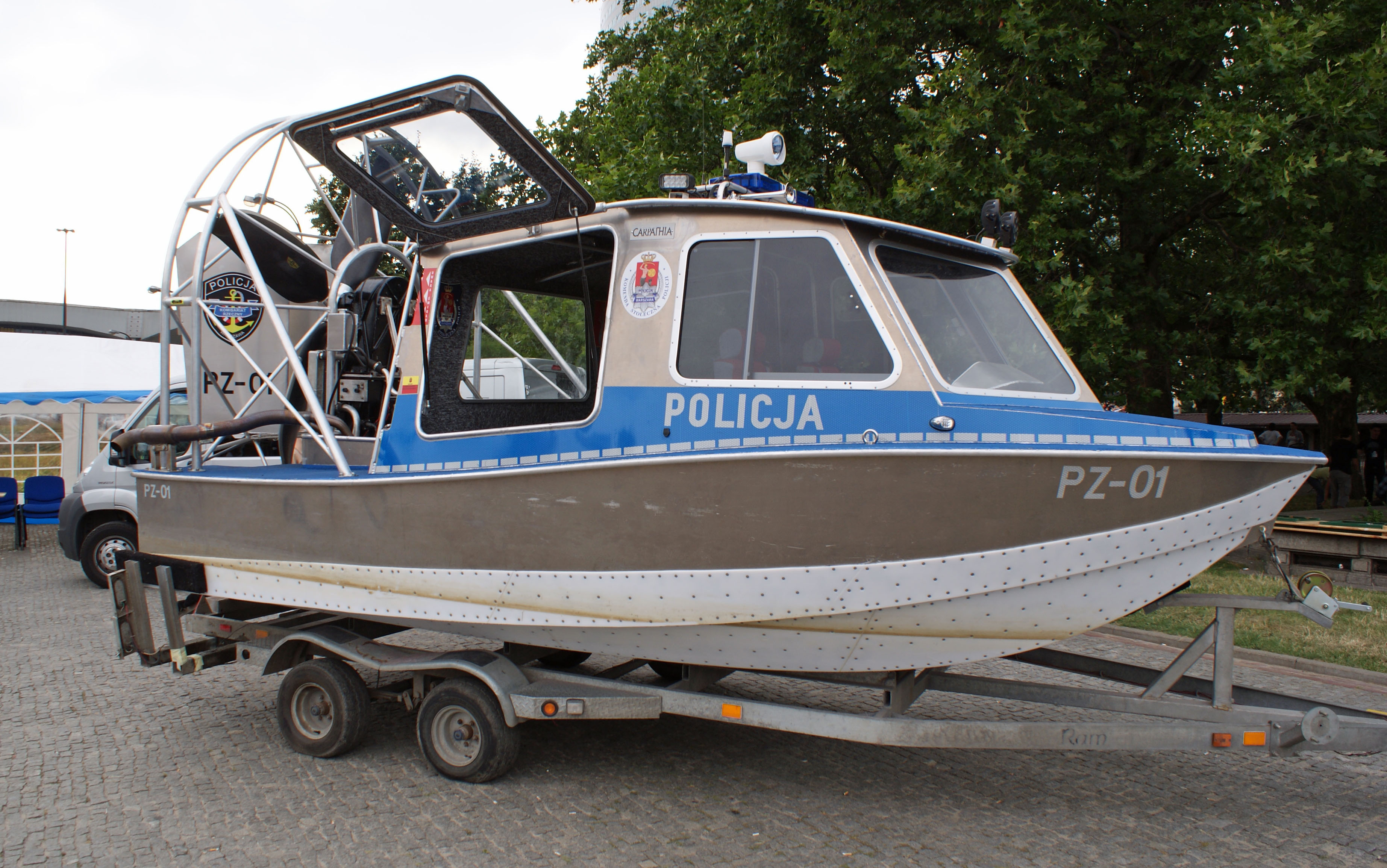 Motorowa łódź policyjna Airboat_PZ-01_Carpathia. Święto Policji, Plac Defilad w Warszawie.